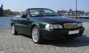 Volvo C70 Convertible 1999, Photo: Kristofer Scheiderbauer, May 2005